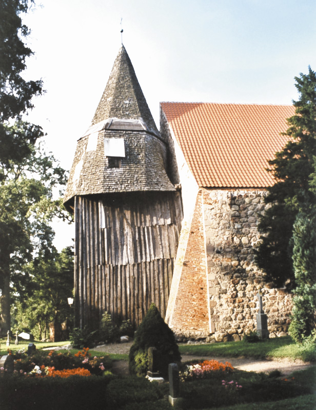 Dorfkirche Tribohm von Süden, frisch eingedeckt